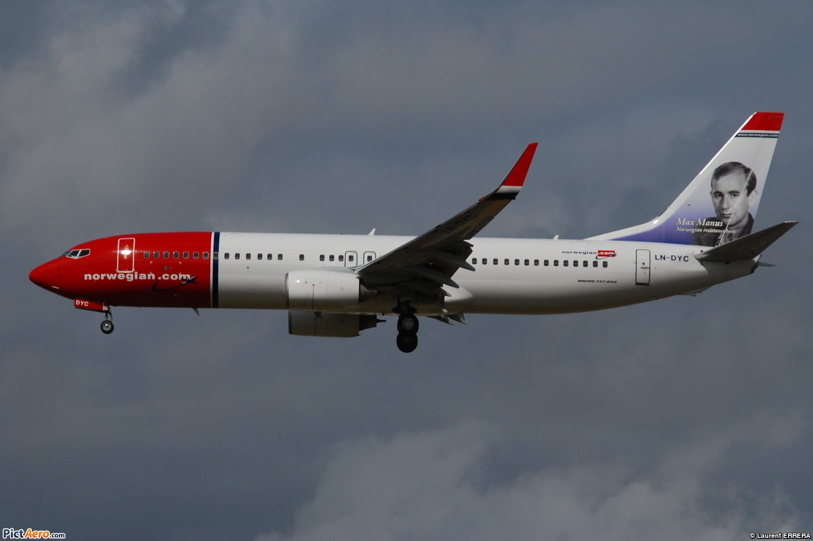 Photo prise à l'aéroport de Londres-Gatwick (EGKK) au Royaume-Uni. Picture take at London-Gatwick Airport (EGKK) in UK.